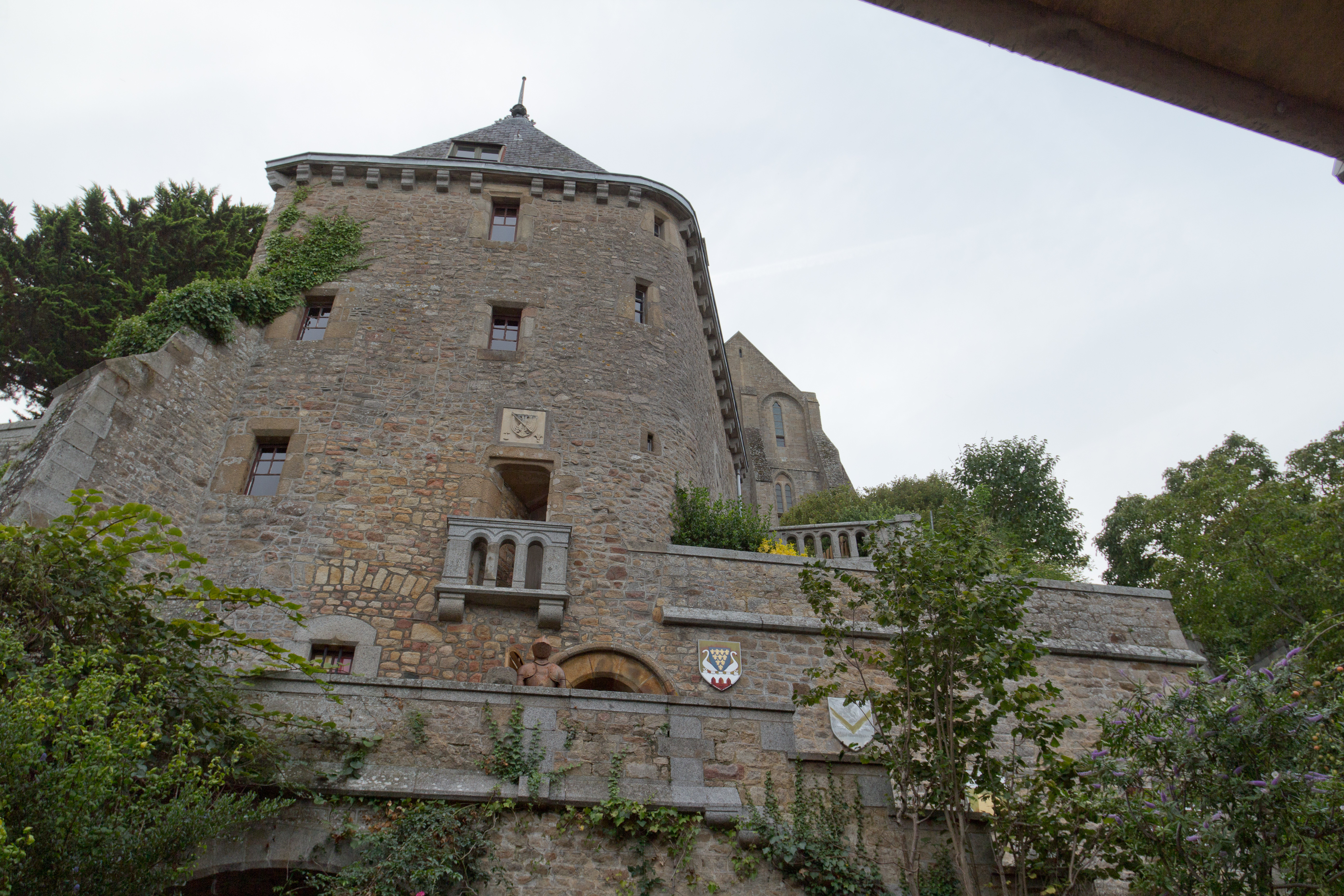 Les armoiries de Bertrand du Guesclin sont placées au dessus du balcon. Tiphaine Raguenel est censée avoir vécu en ce lieu. .